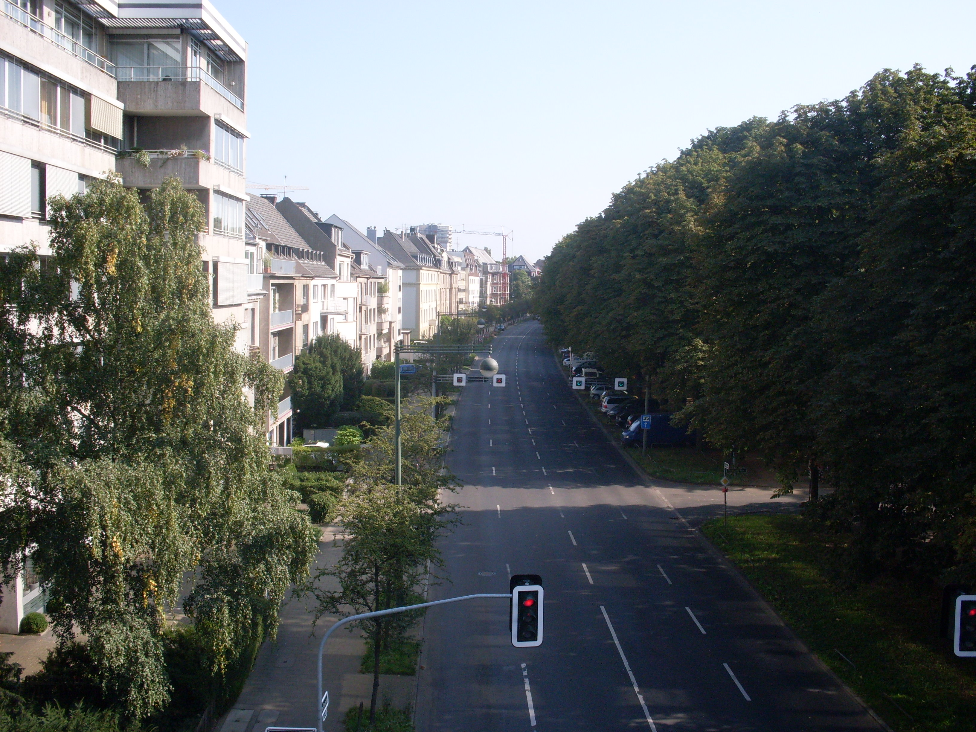 Düsseldorf Cecilienallee, Blick von der Theodor-Heuss-Brücke Richtung Süden